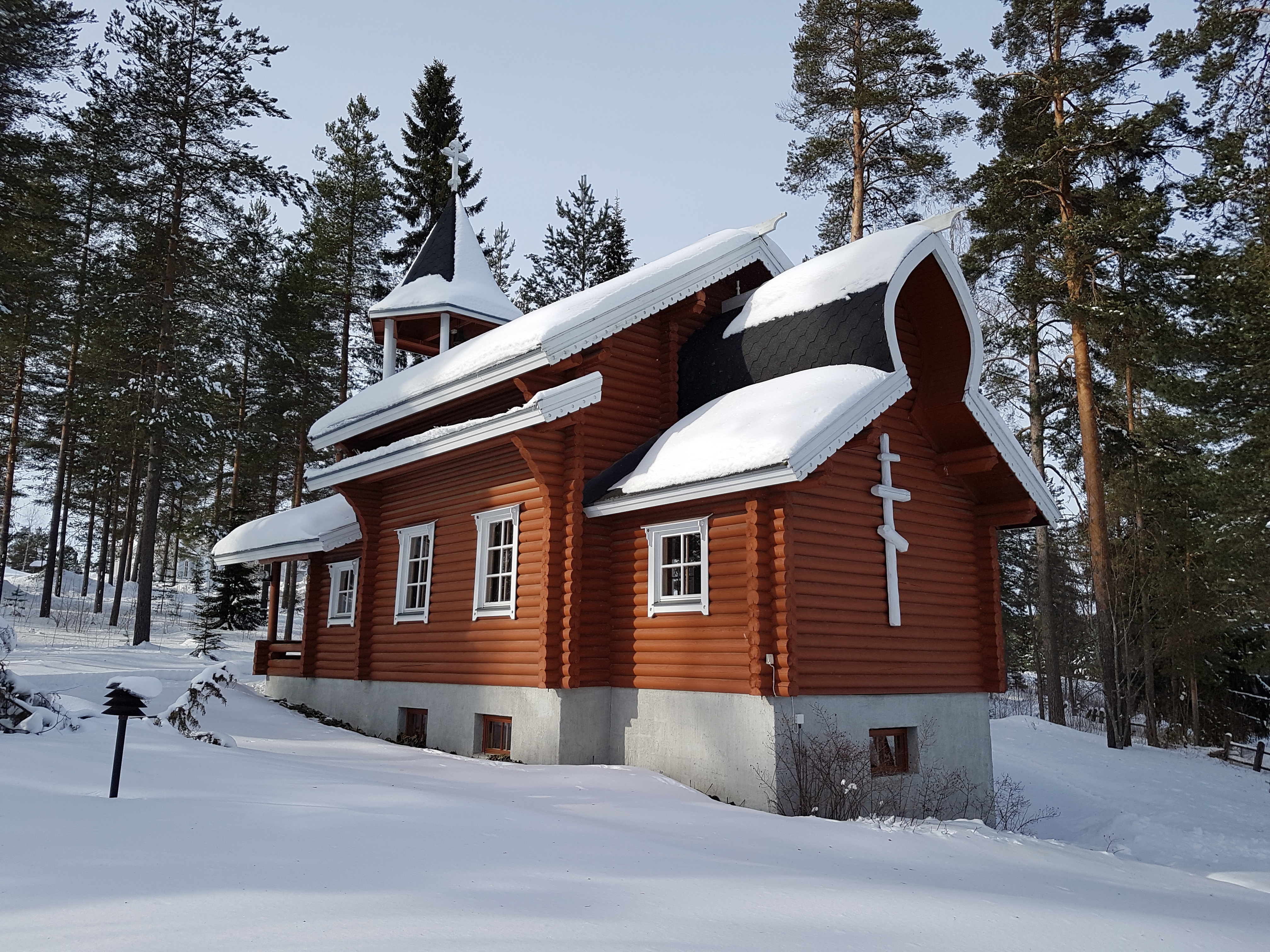 Viitasaaren Kristuksen kirkastumisen tsasouna, rakennettu 1989. Omistaja Jyväskylän ortodoksinen seurakunta.